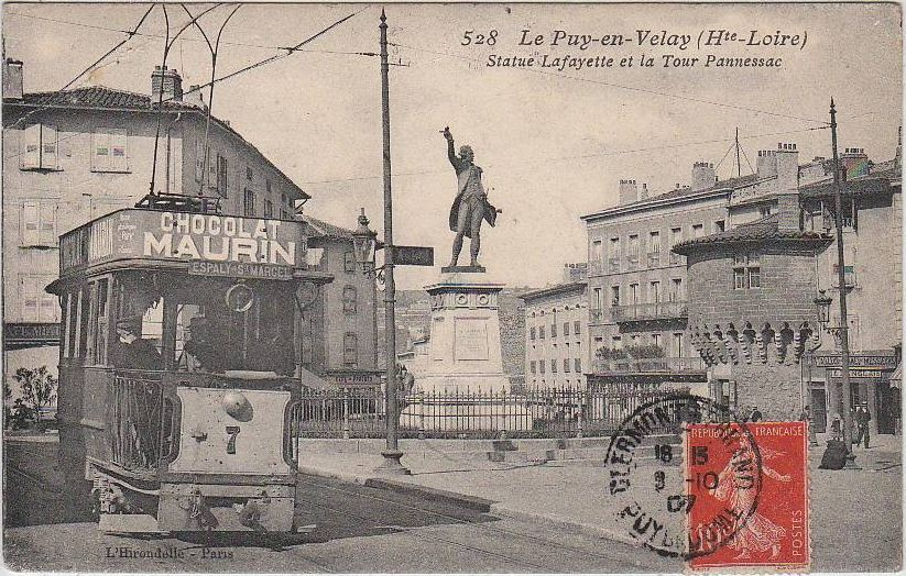 Carte postale ancienne éditée par L'Hirondelle à Paris, n°528 :PUY-EN-VELAY : Statue Lafayette et la Tour Pannessac.